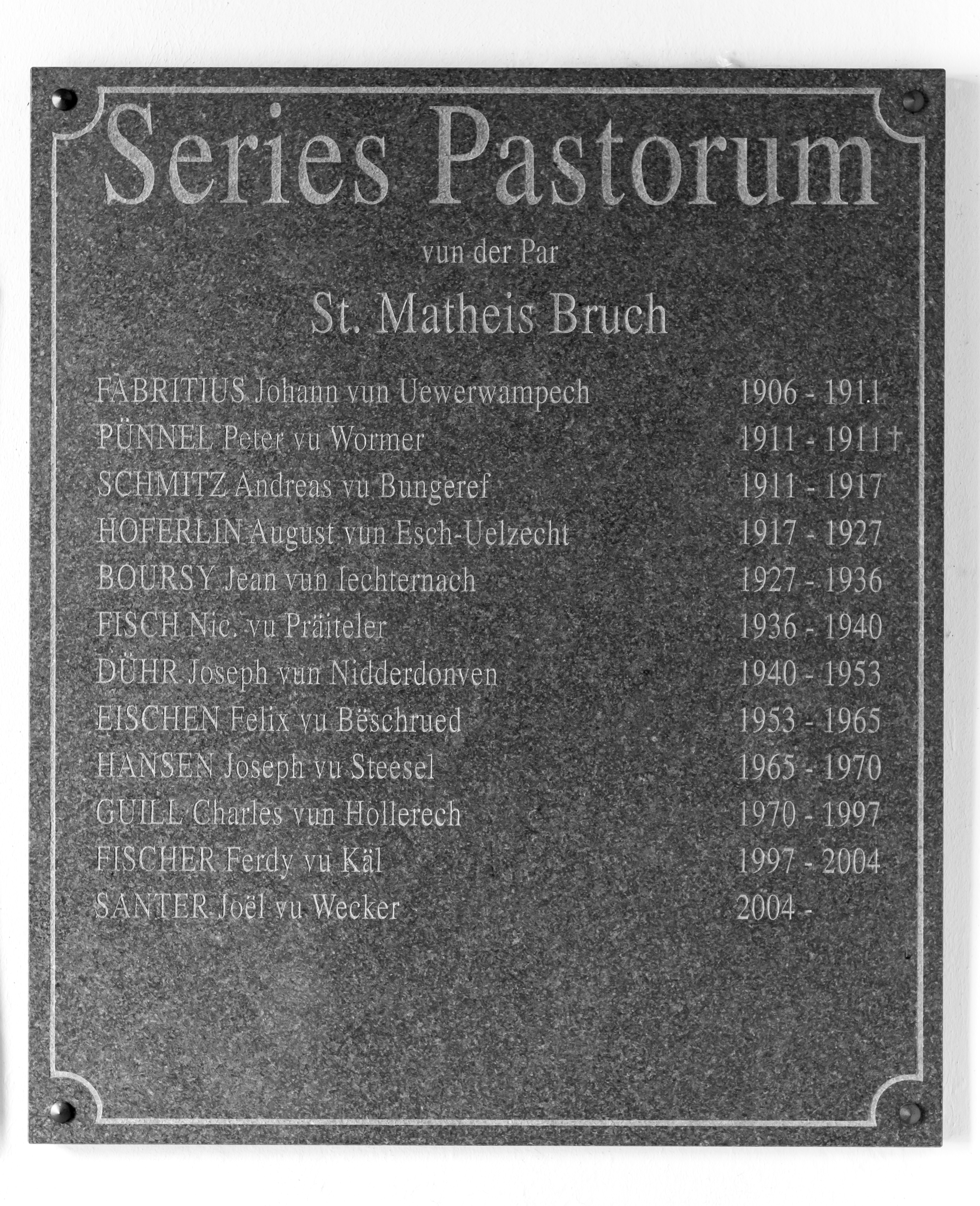 D'"Series pastorum" vun der Par an der Bricher Kierch.